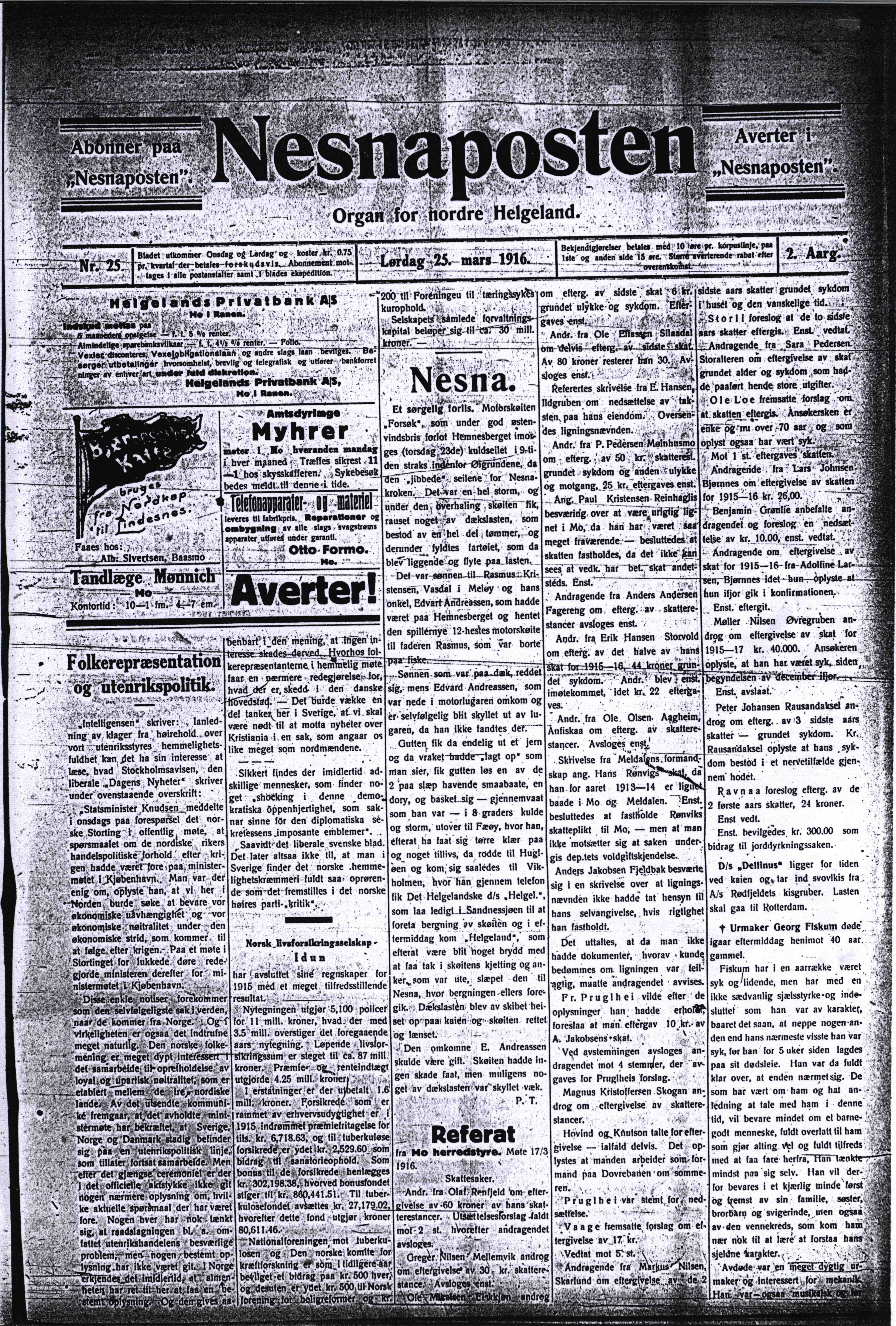 Førstesida på et eksemplar av Nesnaposten